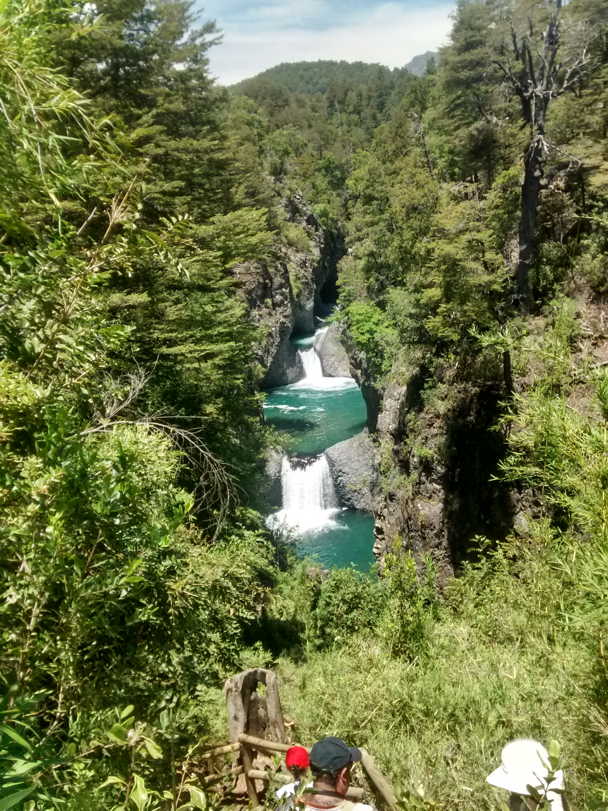 Parque Nacional Radal Siete Tazas